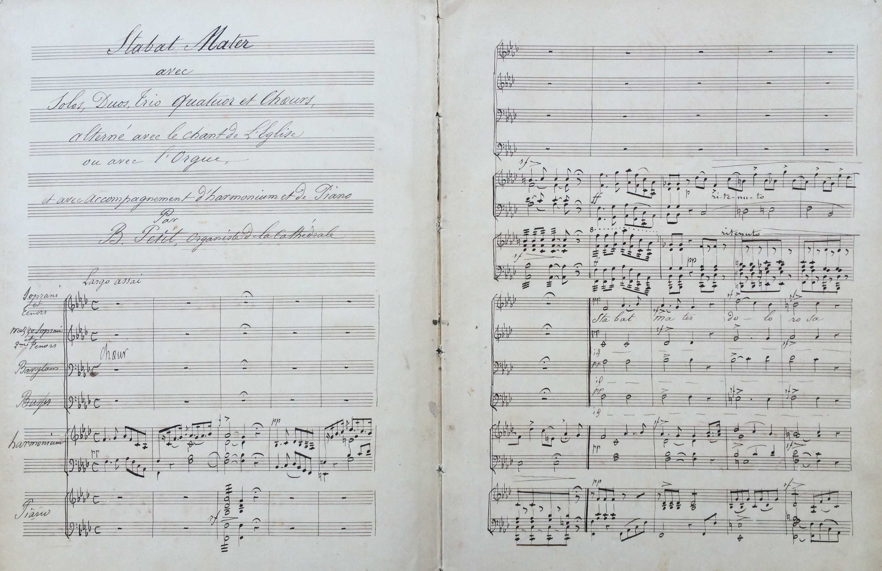 Début du 2ème Stabat mater de Bonaventure Petit dans sa version pour solistes, chœur avec accompagnement d'harmonium et de piano